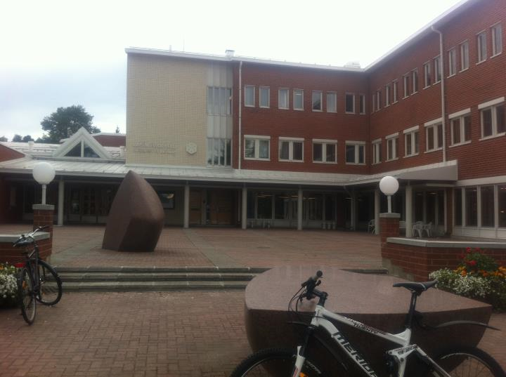 محوطه ی دانشگاه لاپلاند